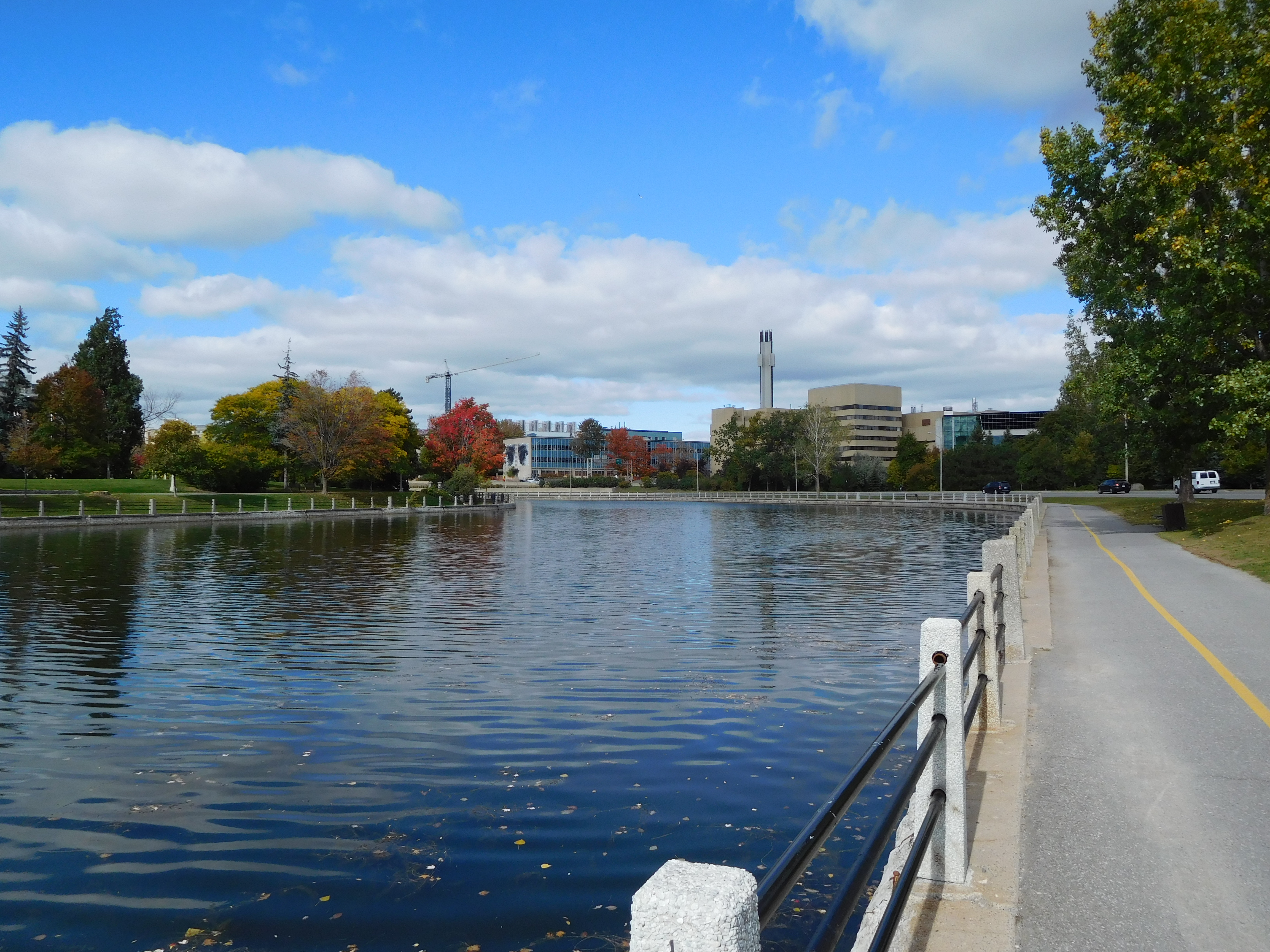 Le canal Rideau près de la promenade du Colonel-By et de la rue Concord Nord On aperçoit à l'horizon des pavillons de l'Université d'Ottawa.